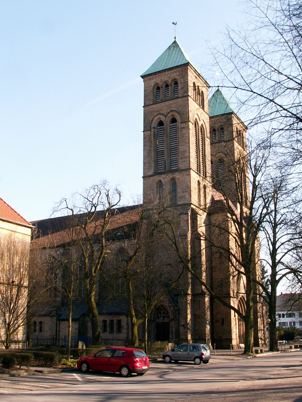 kath. Herz-Jesu-Kirche in Osnabrück, Stadtteil Innenstadt, Ansicht von Nordwesten